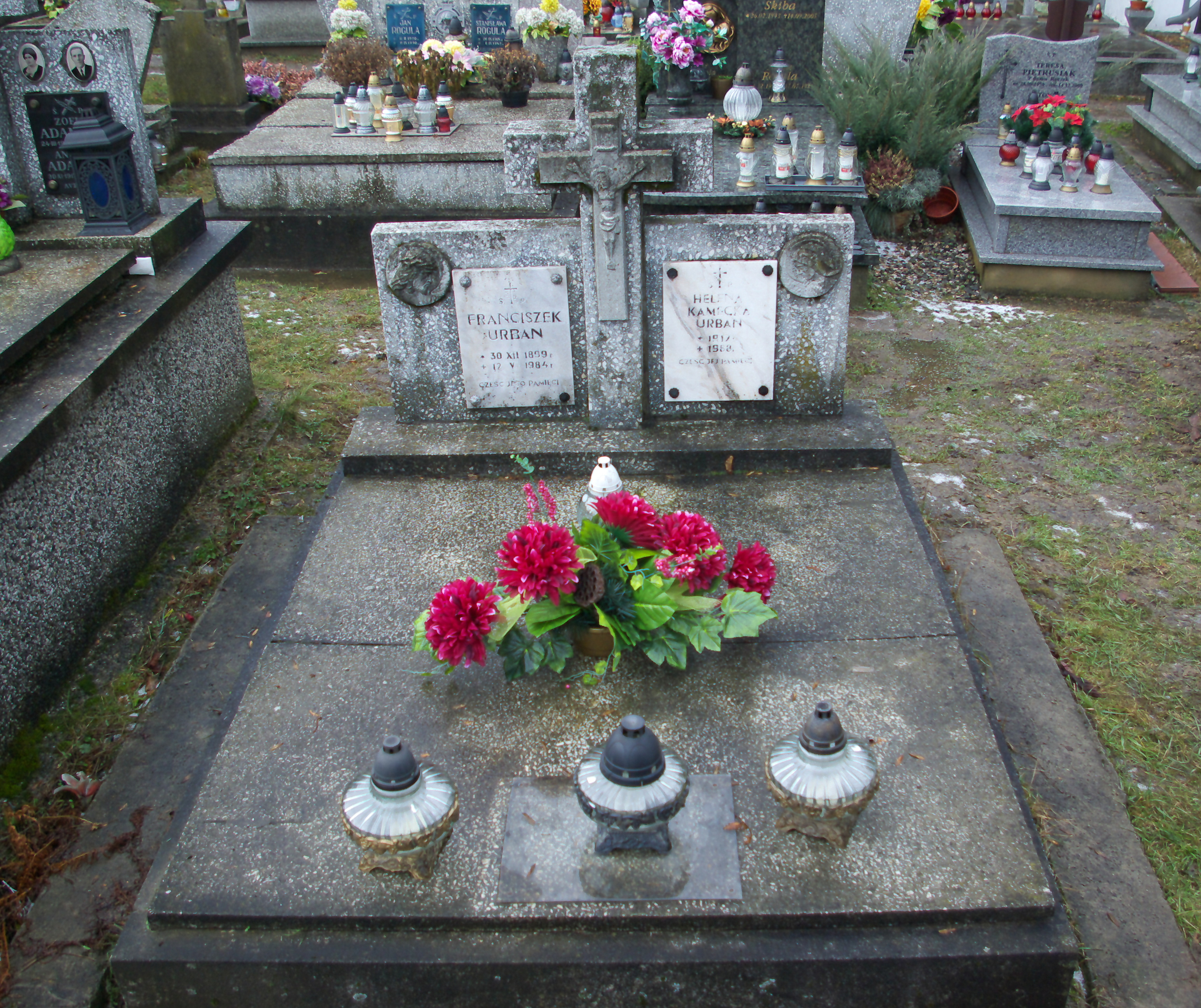 Grobowiec Franciszka Urbana i Heleny Kameckiej-Urban w części „Matejki Stary” Cmentarza Centralnego w Sanoku.